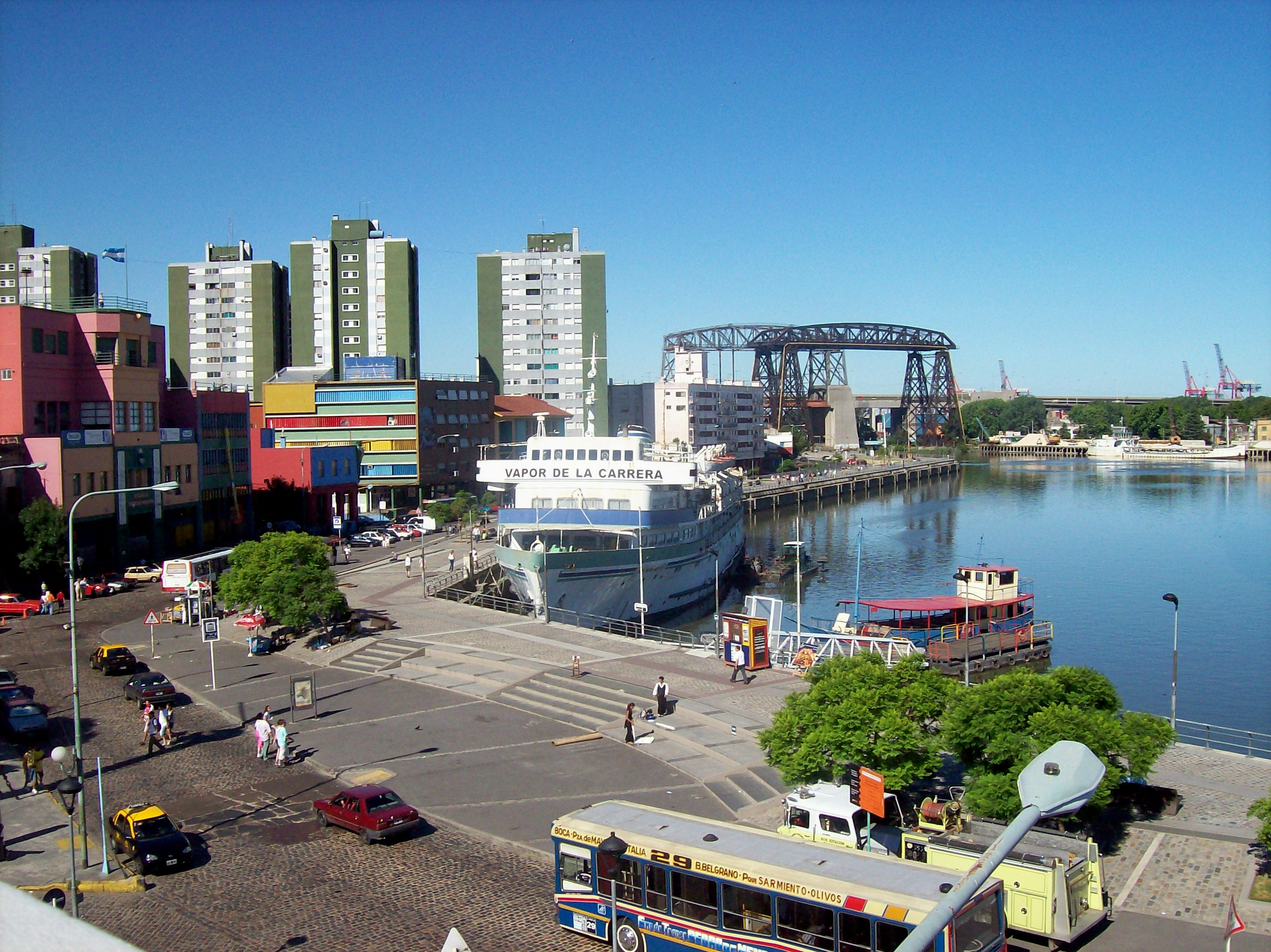 Puerto de La Boca (Ciudad de Buenos Aires), y transbordador sobre el Riachuelo